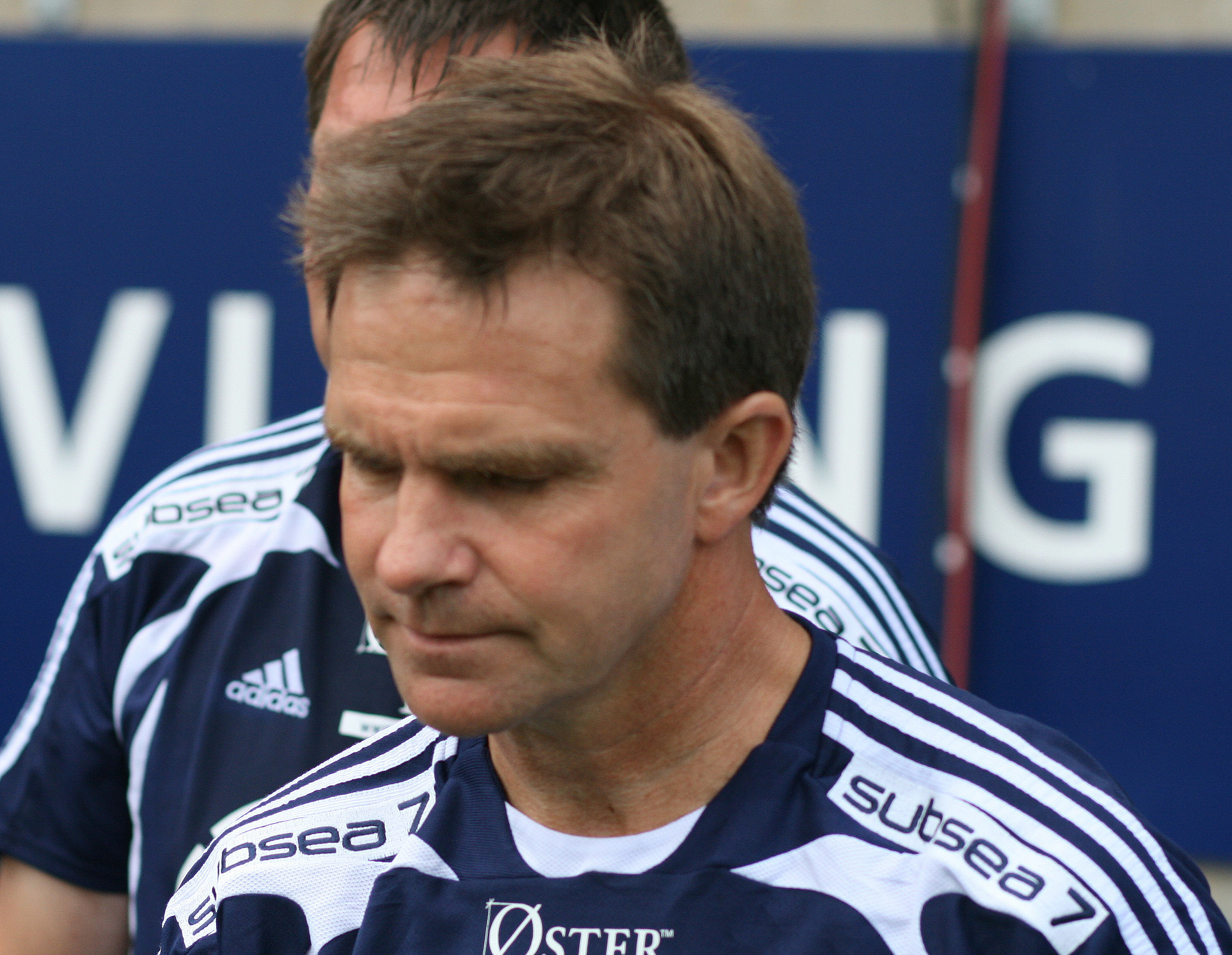 Svein Fjælberg